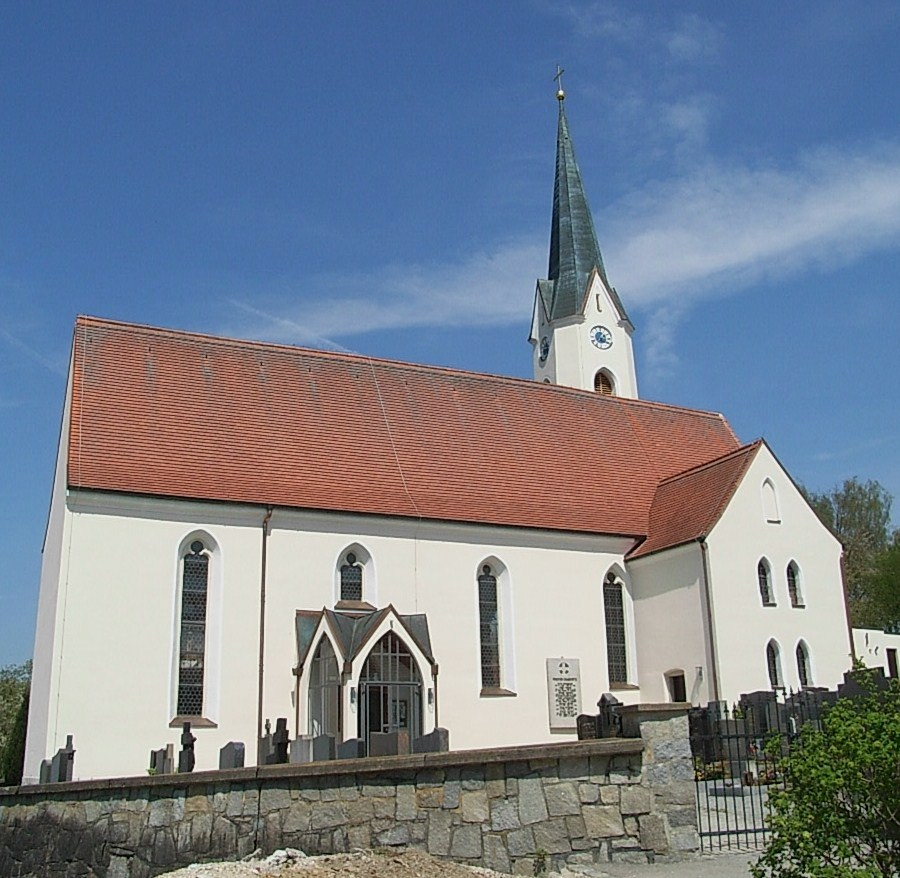 Pfarrkirche St. Martin in Haarbach